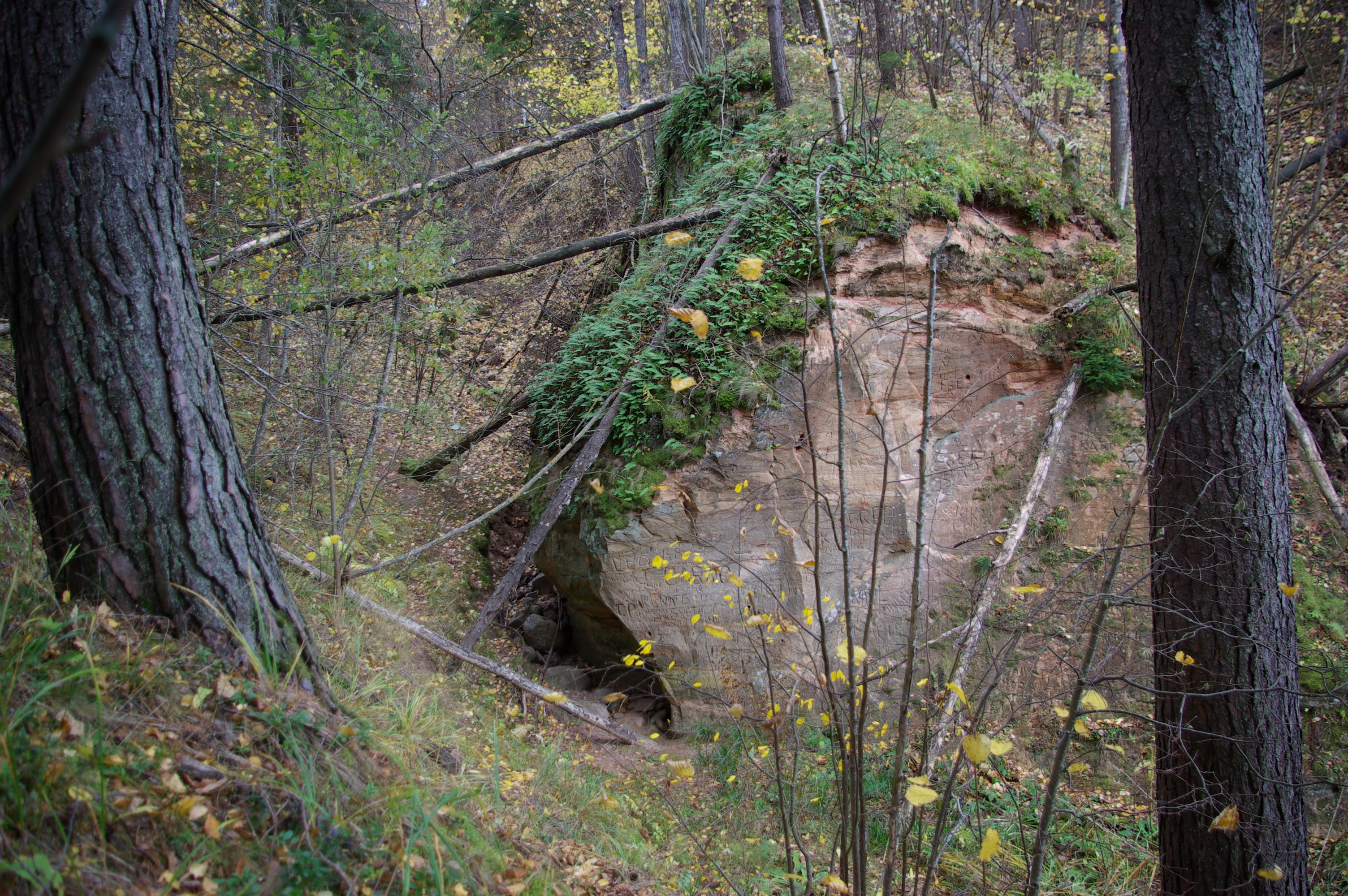 Juudatarõ Obinitsa järve kaldal